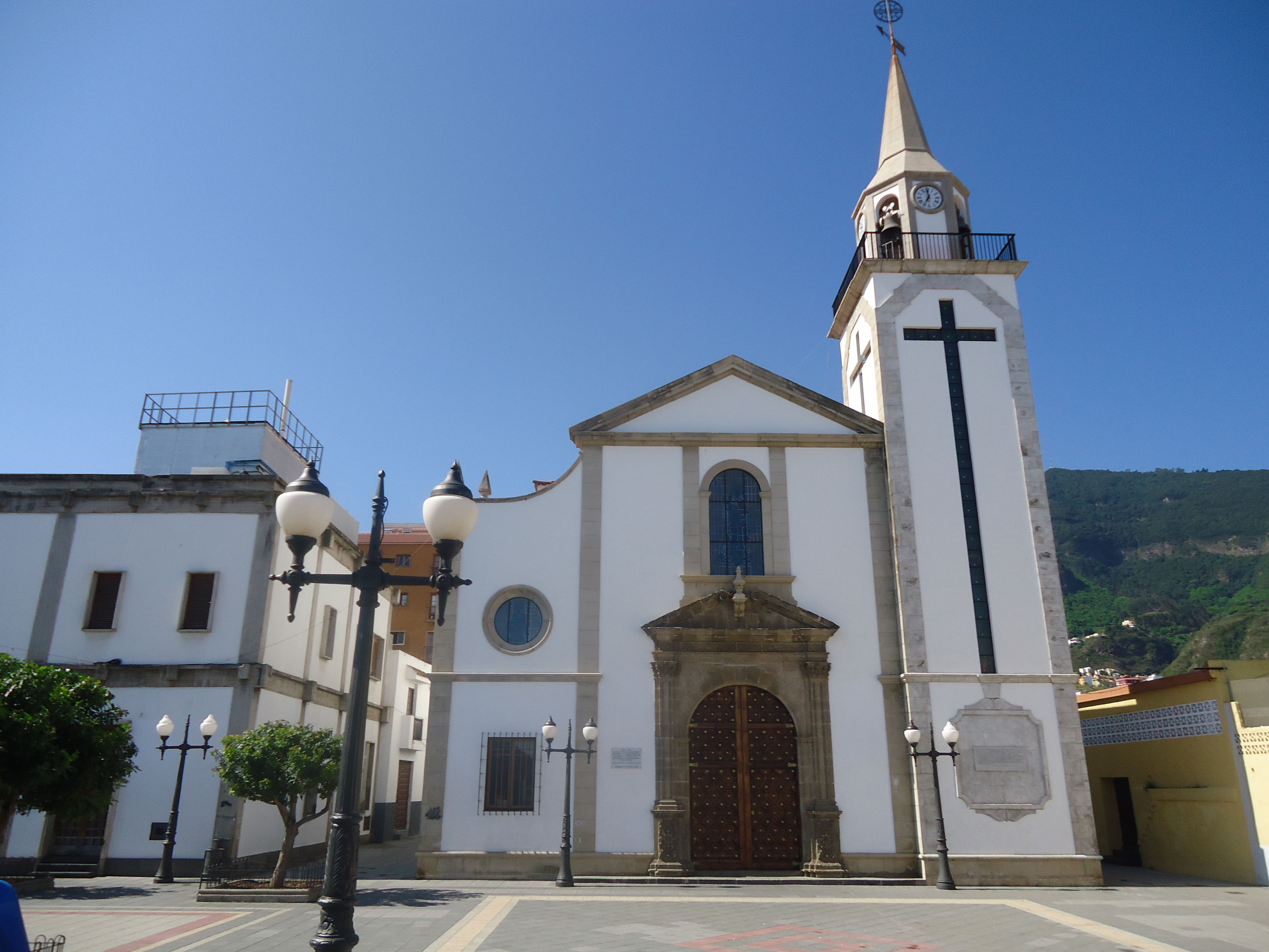 Iglesia de Nuestra Señora del Carmen, San Agustín, Los Realejos